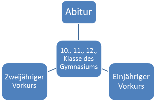 Infografik gymnasialer Zweig des Spätberufenengymnasiums